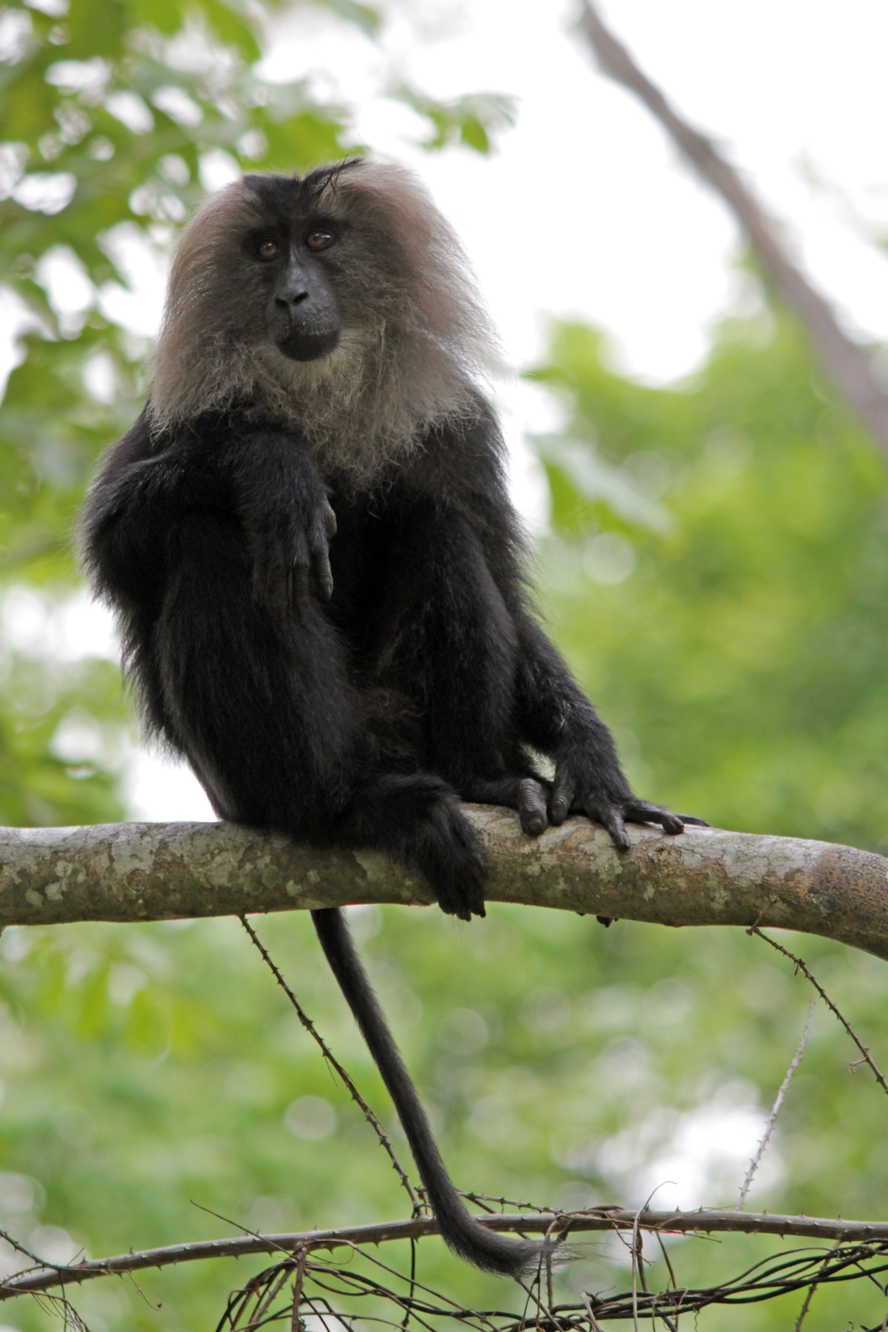 Lion Tailed Macaque